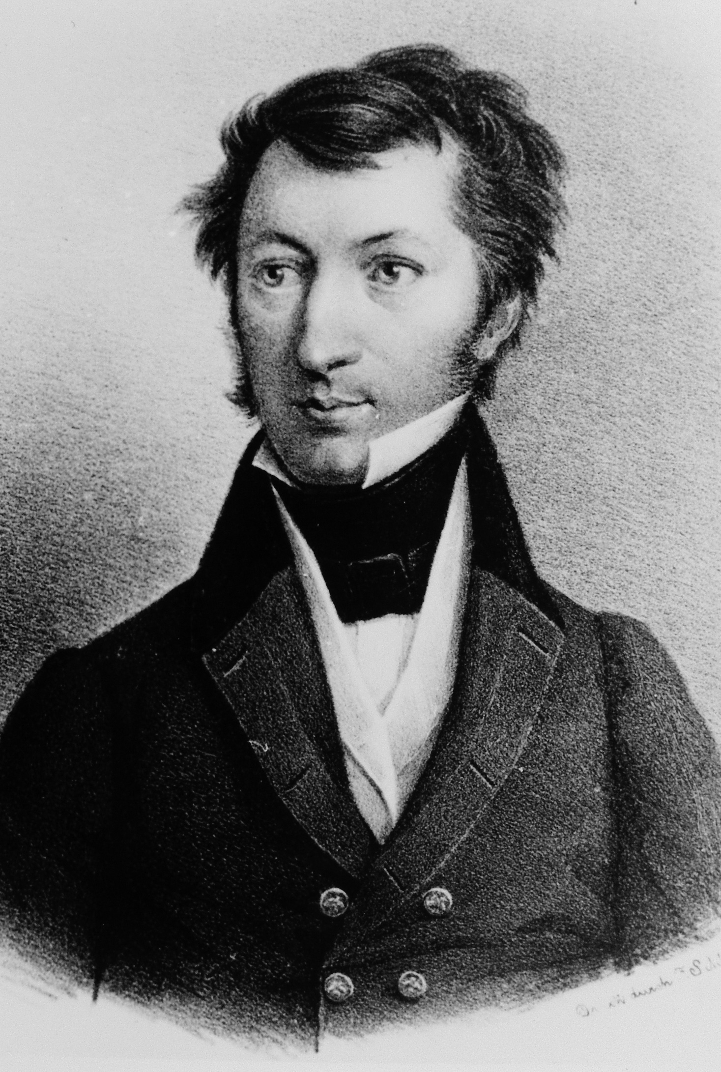 Chemiker Carl Christoph Göbel (* 21. Februar 1794 in Niederroßla bei Weimar; † 27. Maijul./ 8. Juni 1851greg.[1] in Dorpat in Estland)